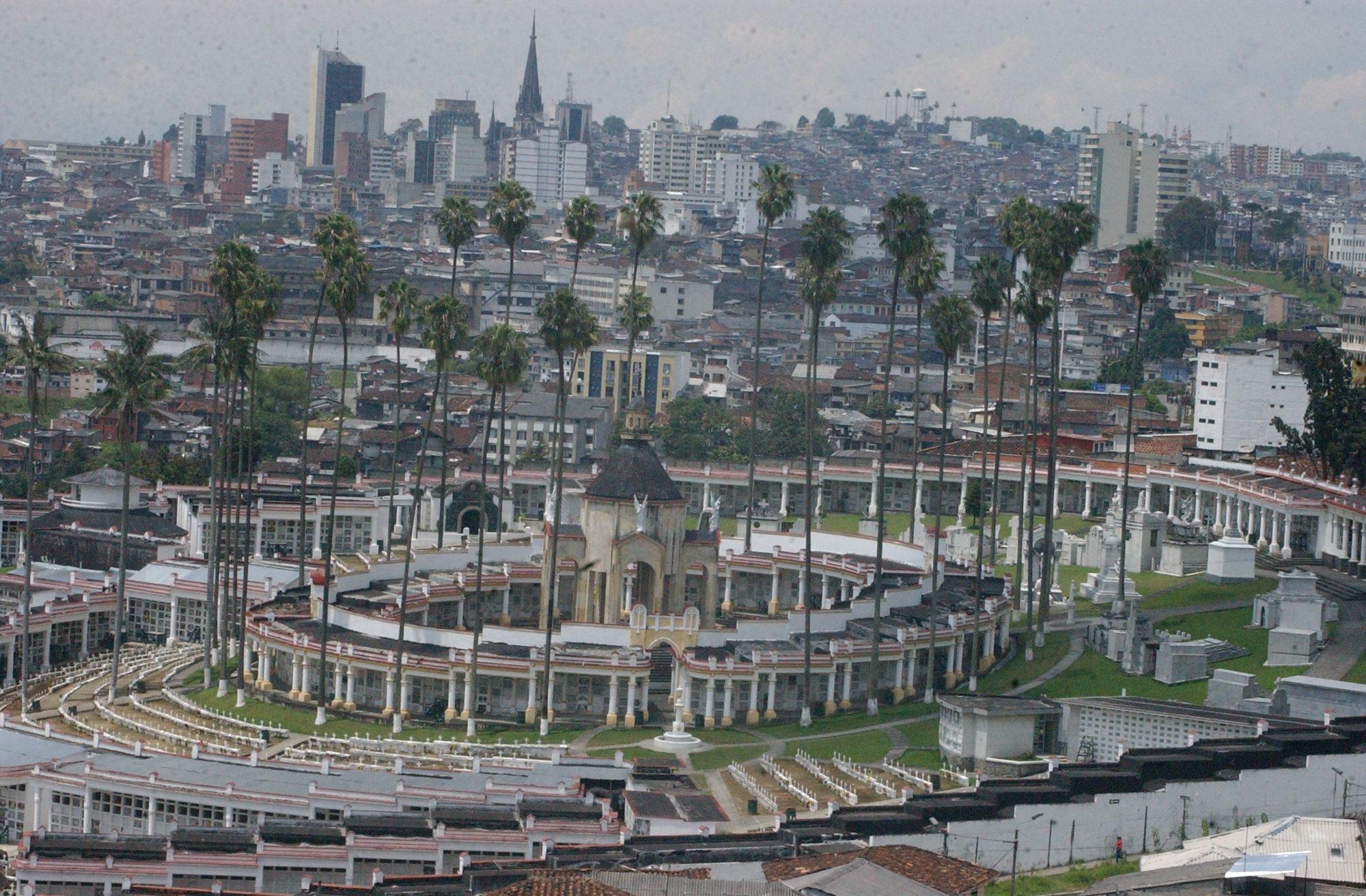 Cementerio de Manizales, Colombia.jpg